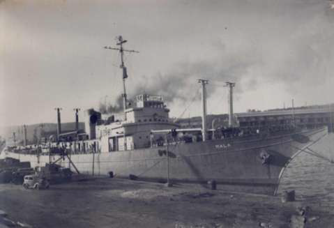 אוניית העולים מאלה בכינויה כלנית בנמל מרסיי